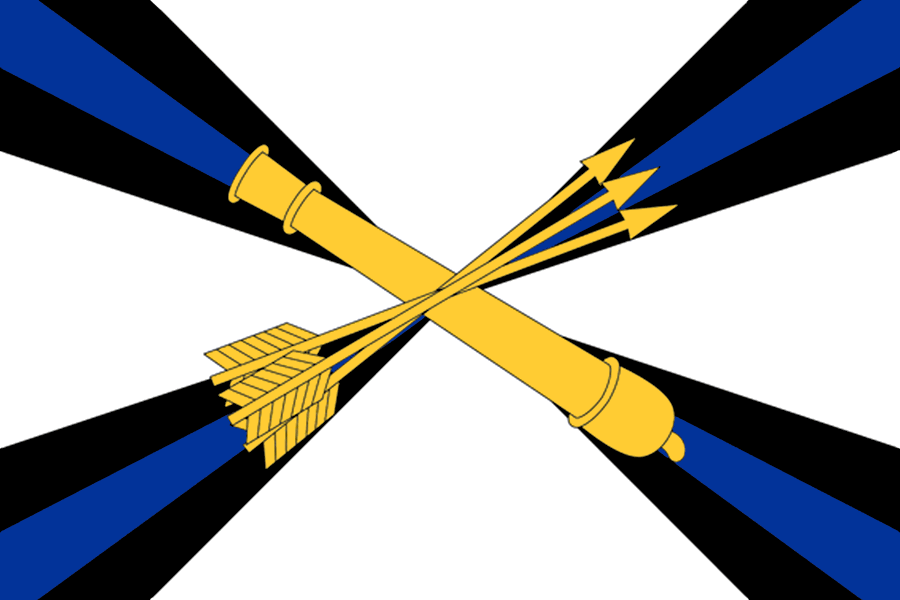 Флаг войсковой противовоздушной обороны, Россия